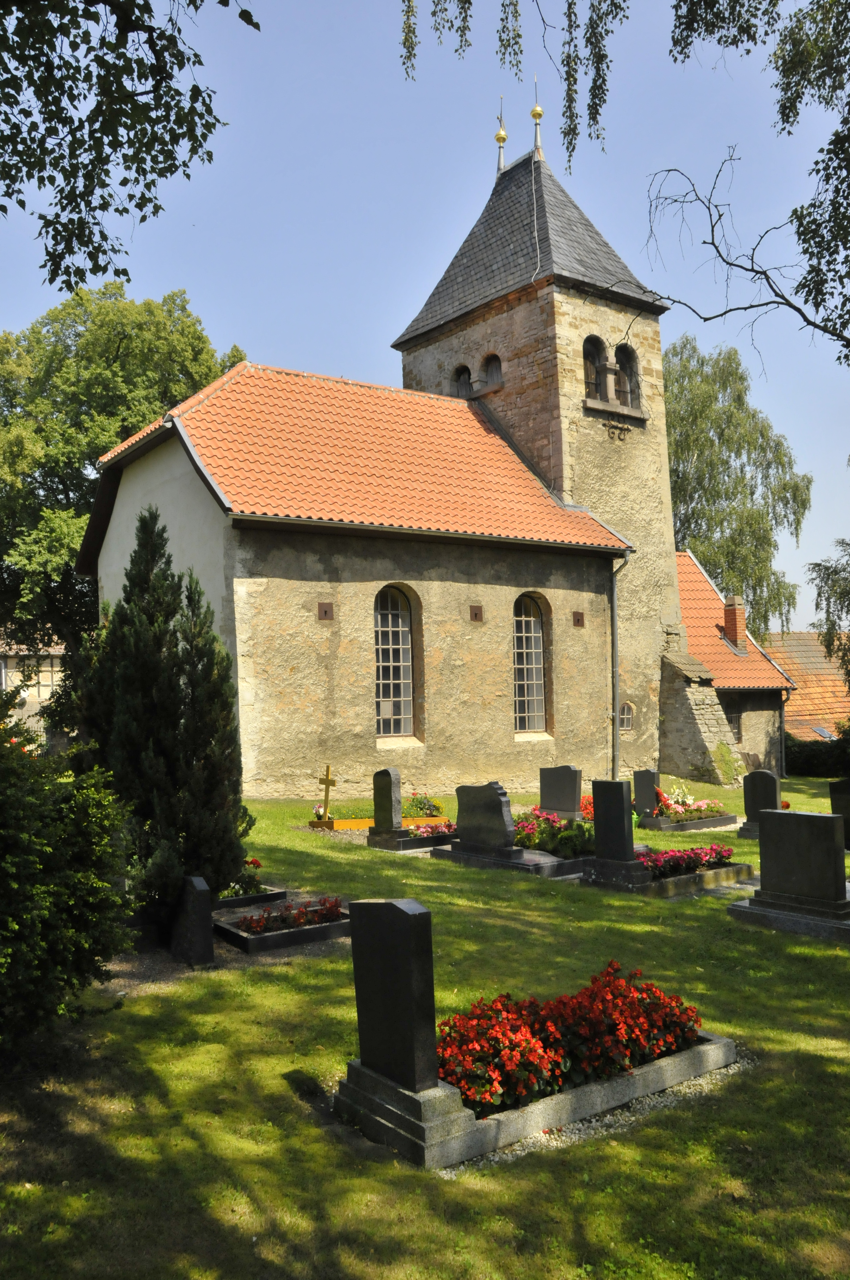 Bliederstedt, Kirche